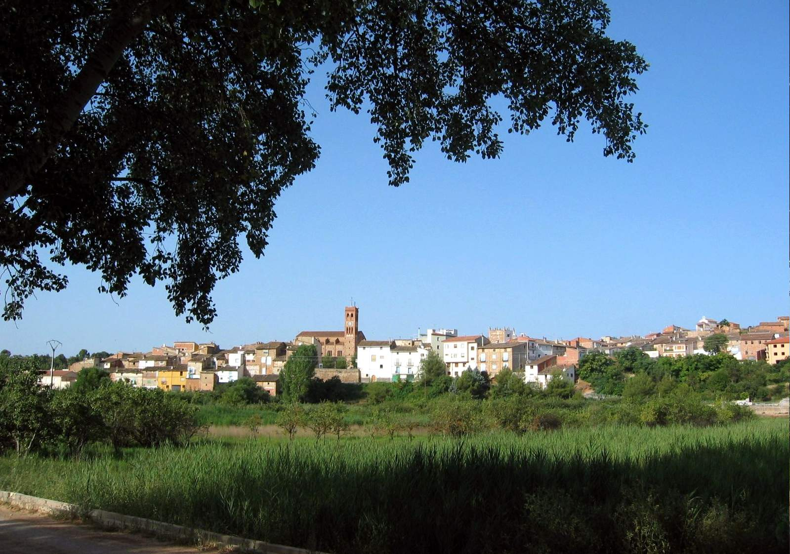 Vista general de Torrebaja (Valencia), desde El Rento, con detalle de cultivos.